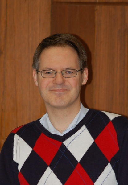 Prof. Dr. Dr. Hannes Leitgeb